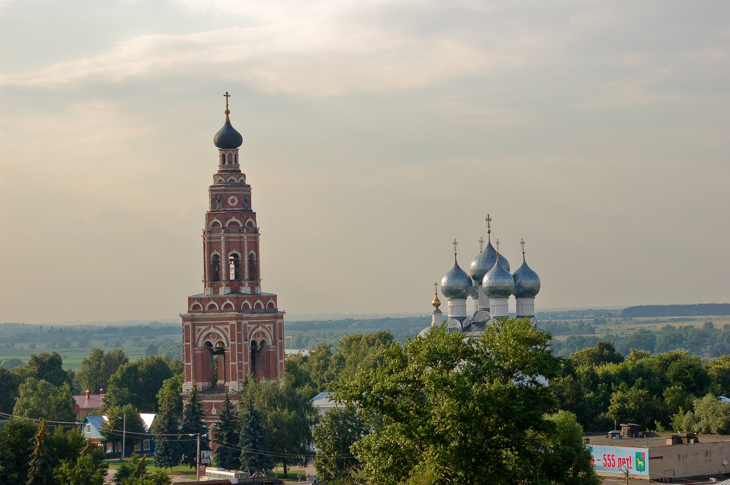 Вид на Колокольню и Собор Михаила Архангела. город Бронницы